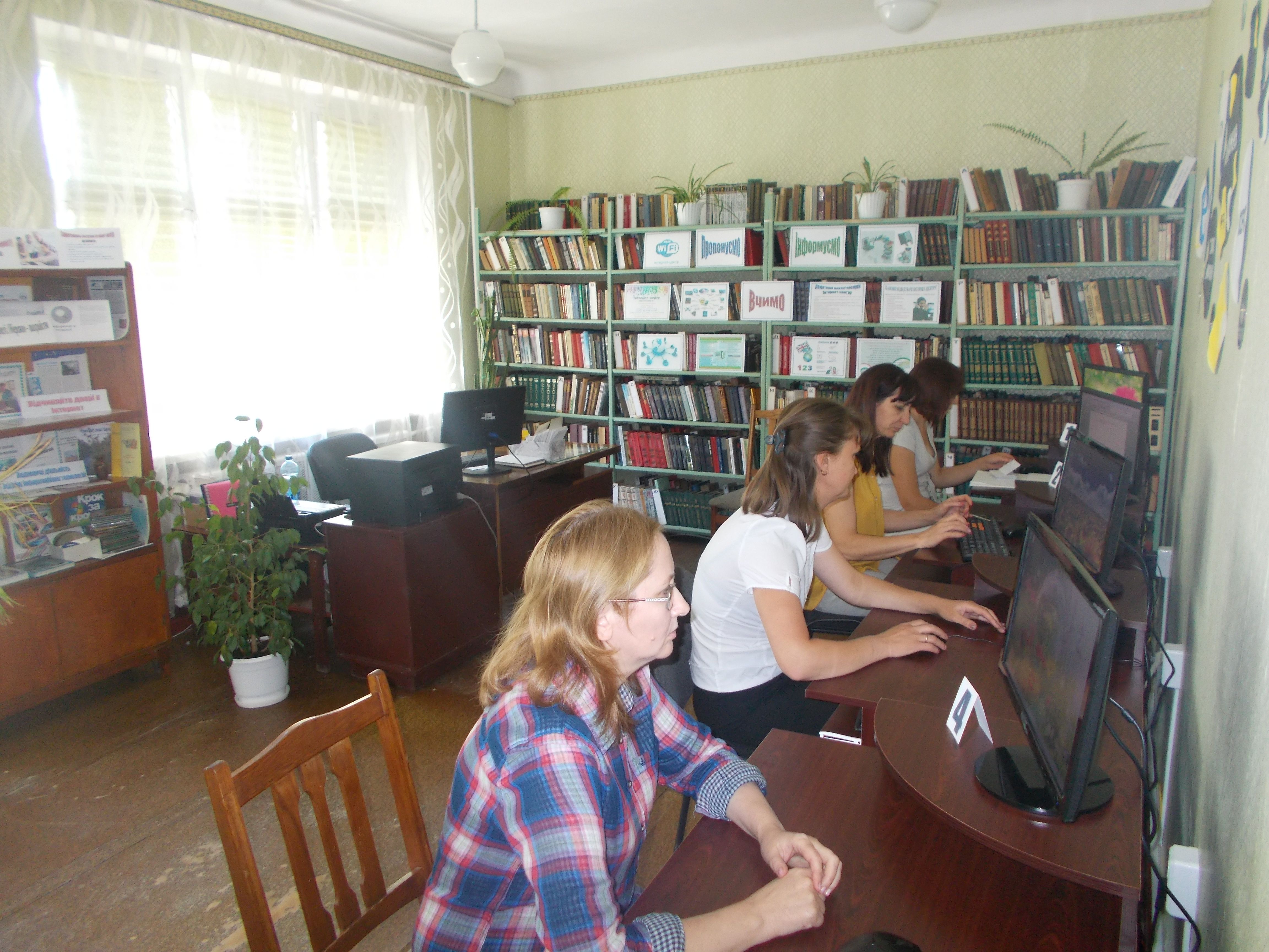 приміщення